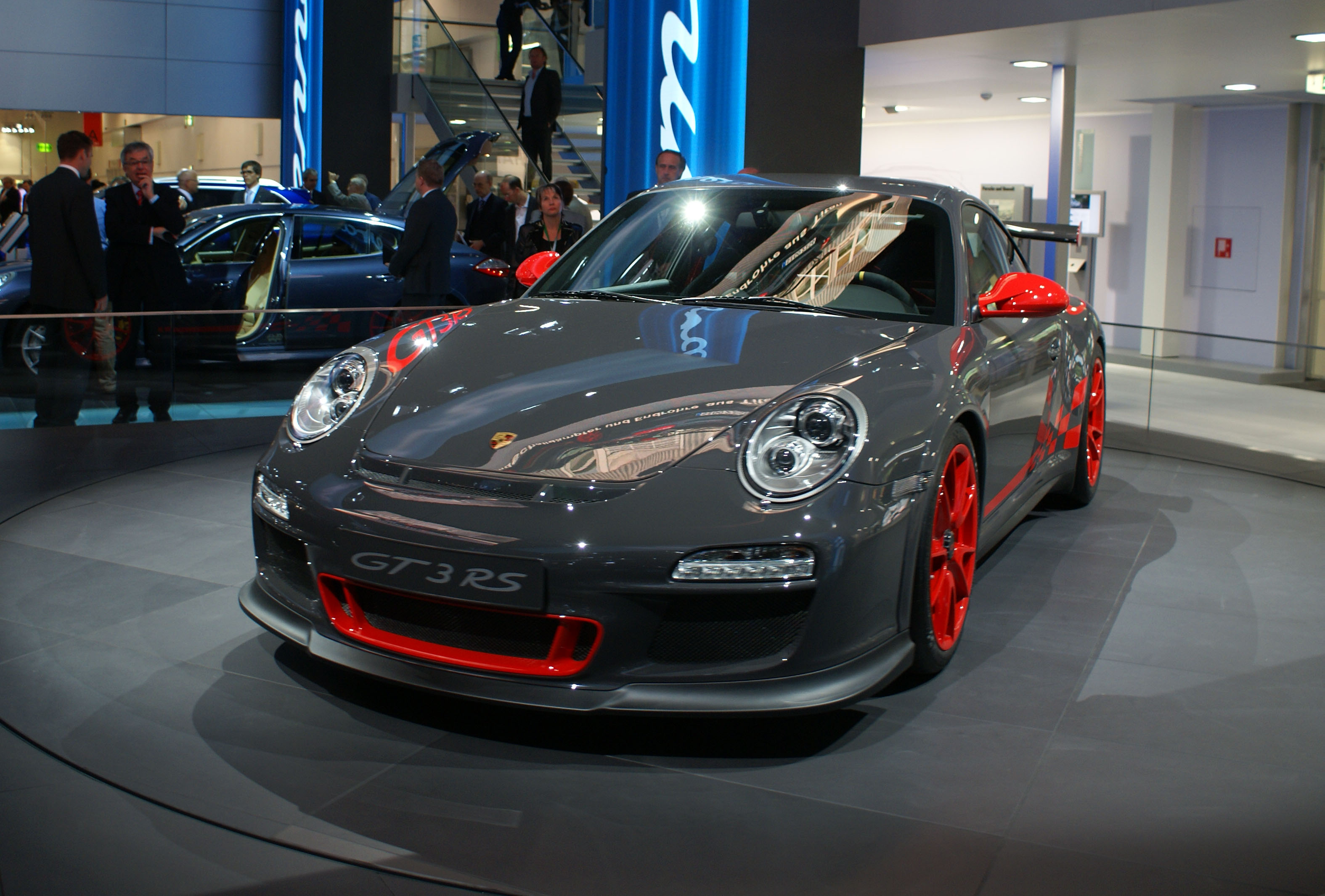 Porsche 911 GT3 RS (997 facelift)